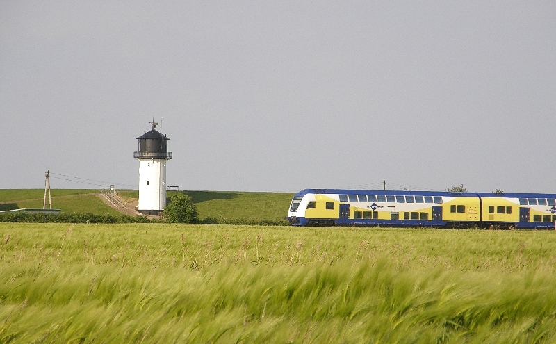 Der alte Leuchtturm die "Dicke Berta" in Altenbruch und der Metronom